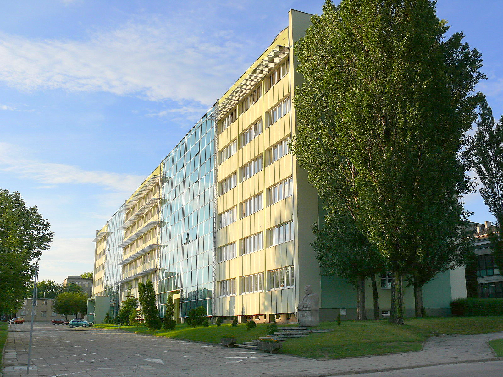 Wydział Biotechnologii i Nauk o Żywności Politechniki Łódzkiej ul. Stefanowskiego 2, Łódź